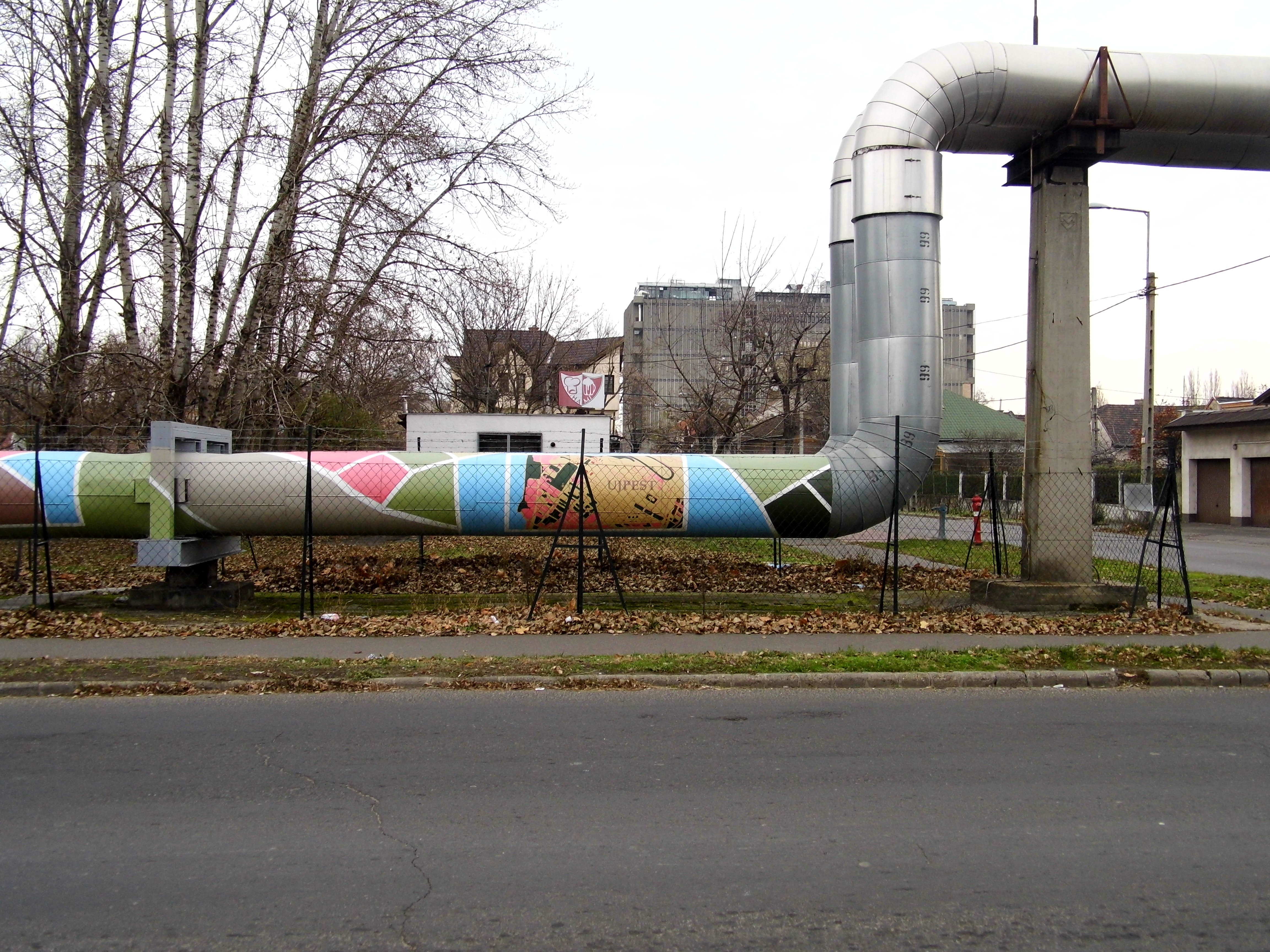 Az Újpesti Erőmű kifestett csővezetéke